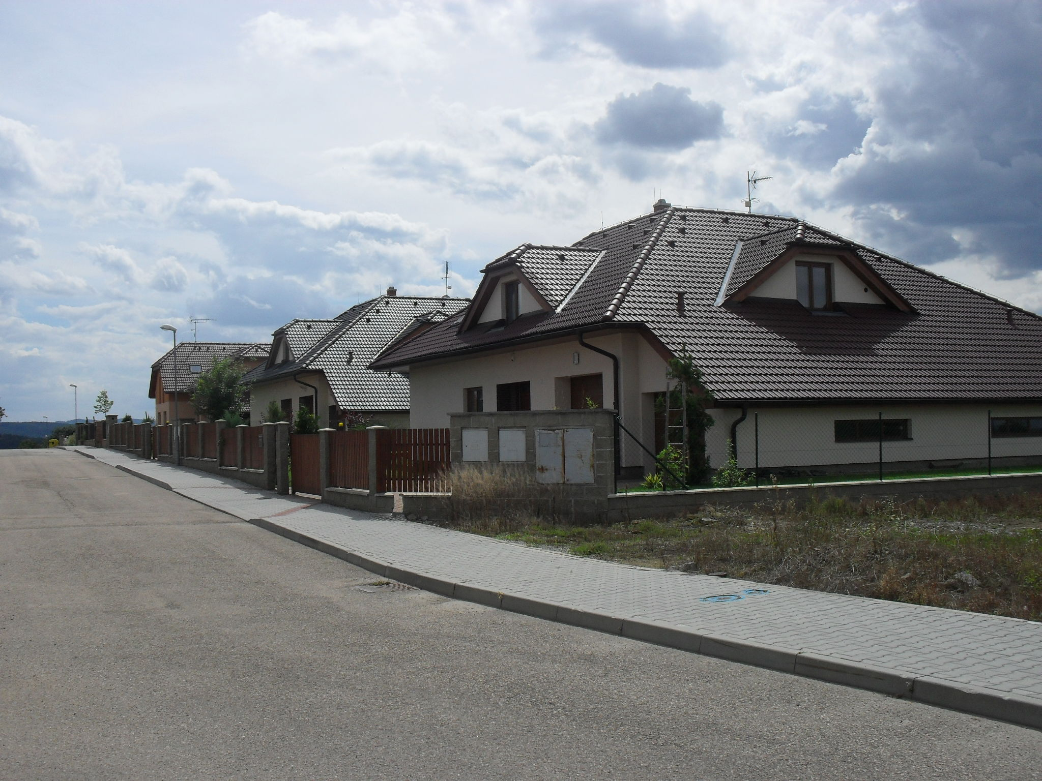 Nová zástavba v části města Benešov - Mariánovicích